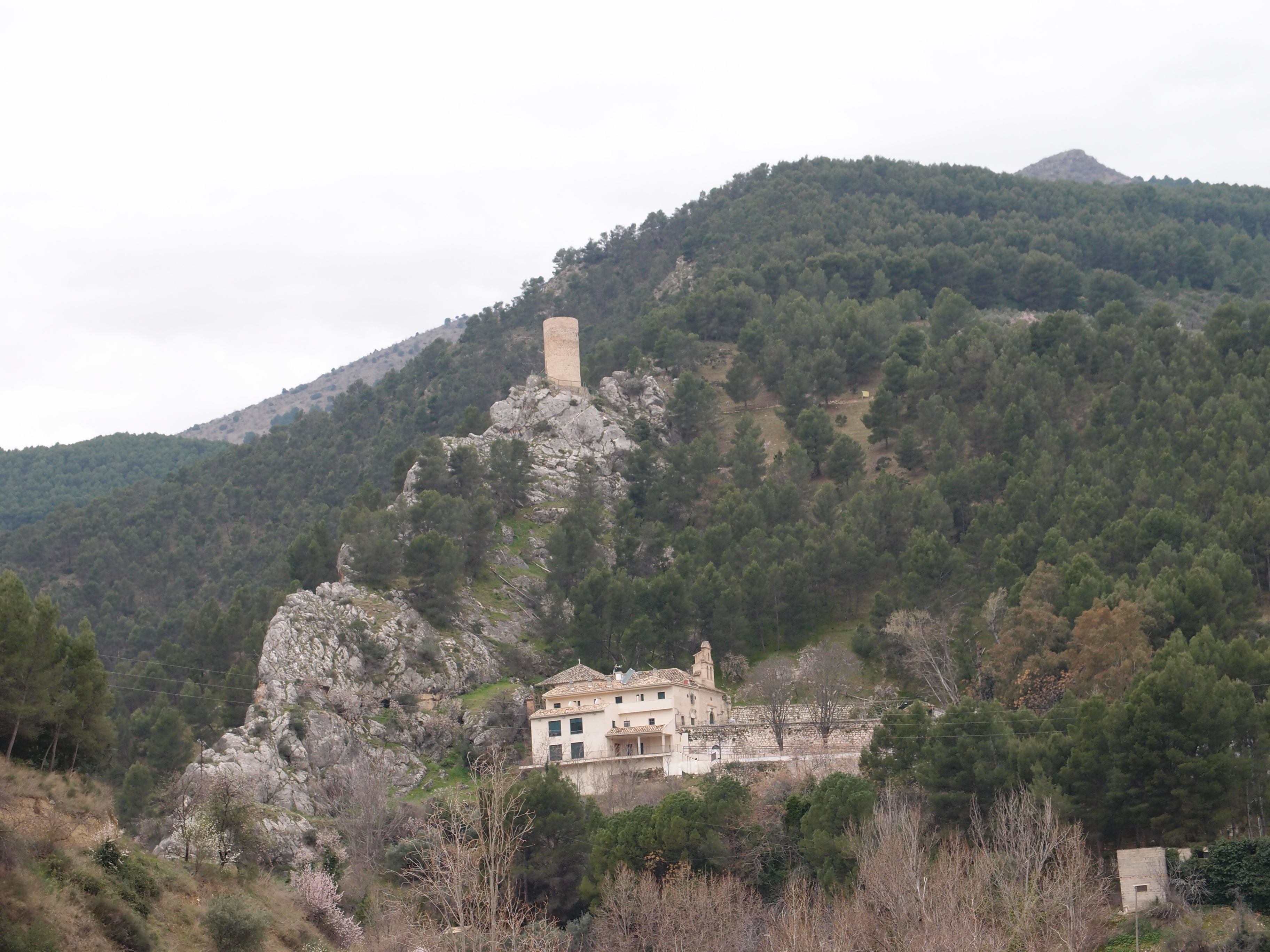 Vista de la ermita y de la torre de Cuadros, en el Parque Natural de Sierra Mágina.